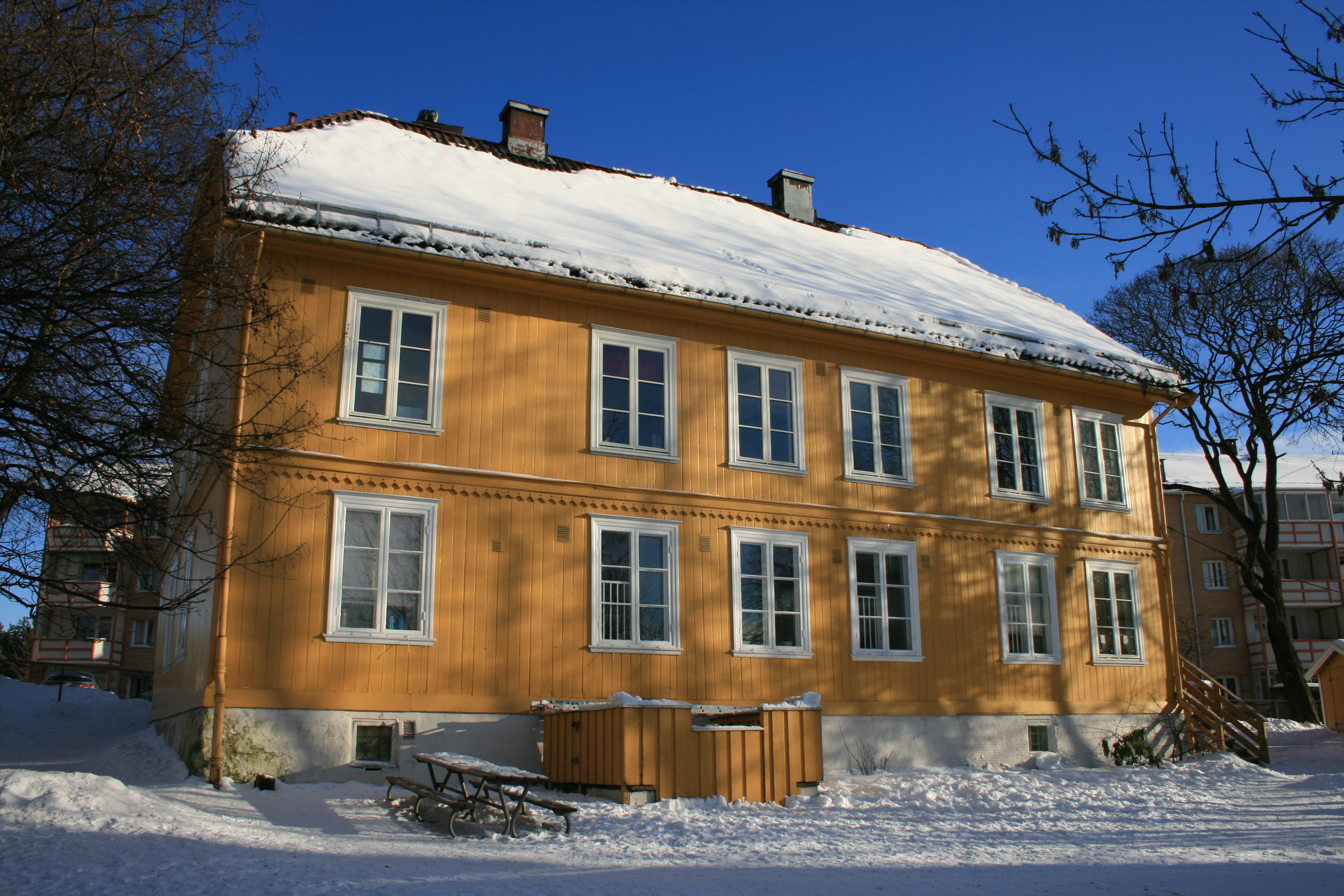 Vallefaret 14 oppført i 1840. Ominnredet til barnehage i 1954.